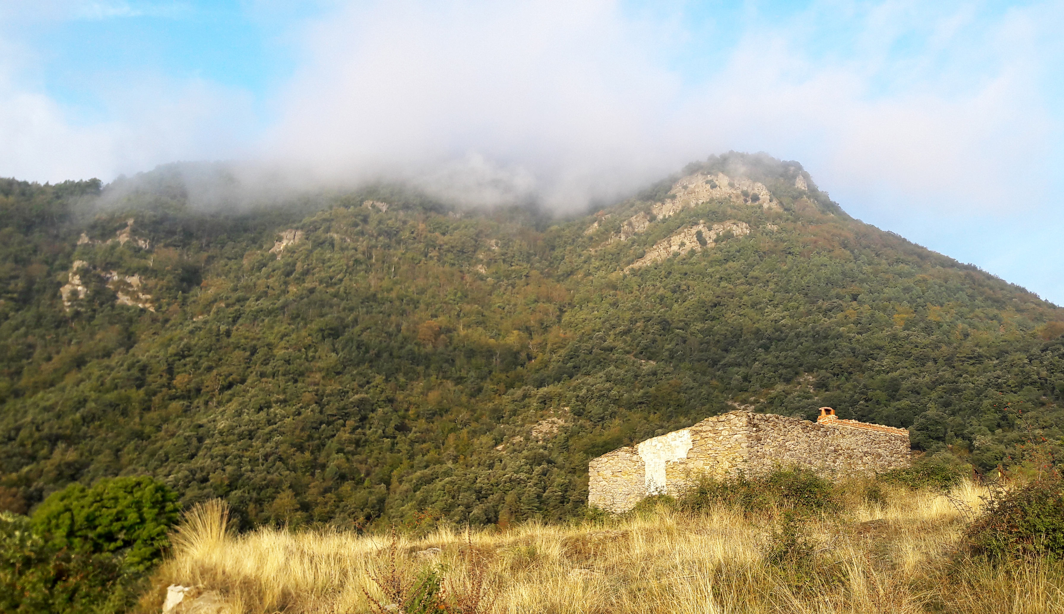 Mas Sobirà (Albanyà)